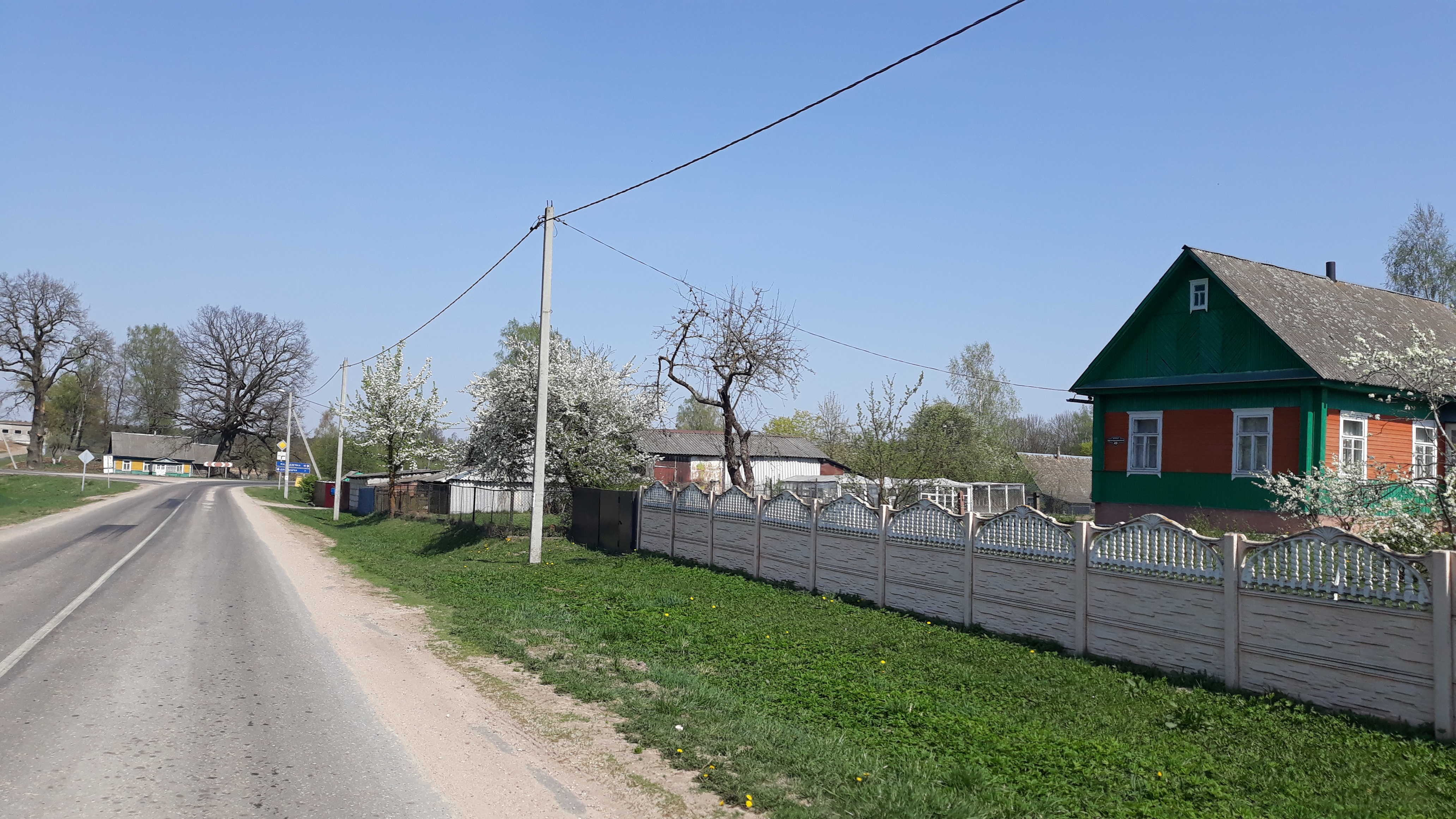 краявід вёскі